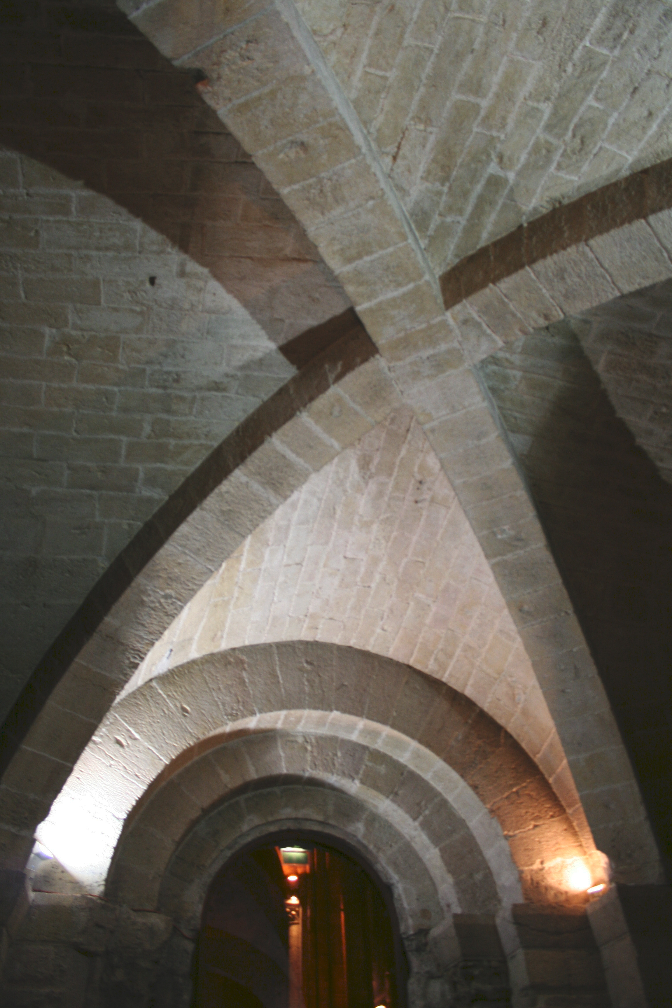 Voute du porche d'entrée de l'abbaye de Saint-Victor